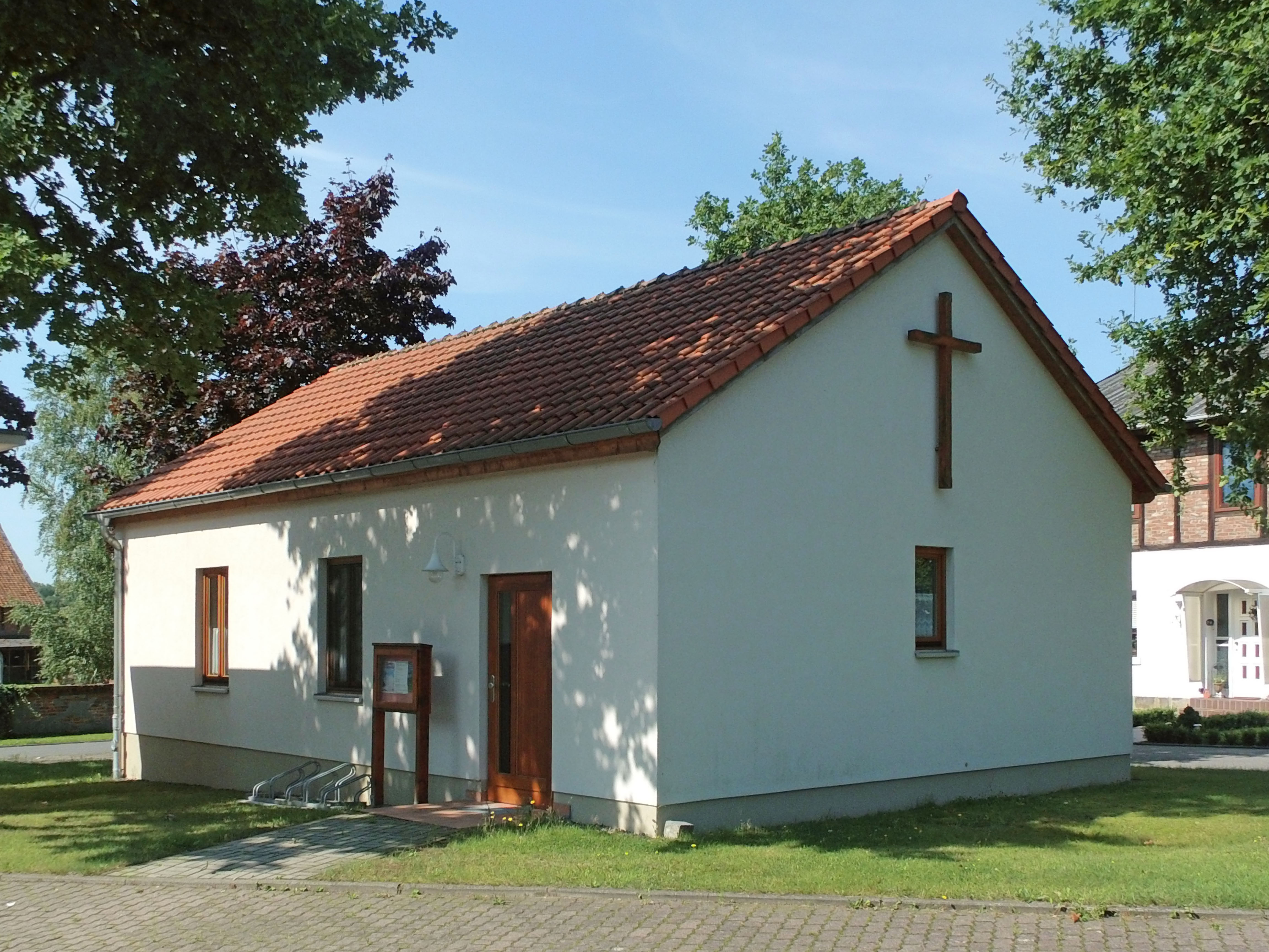 Evangelisch-lutherischer Gemeinderaum in Eischott (Landkreis Gifhorn).